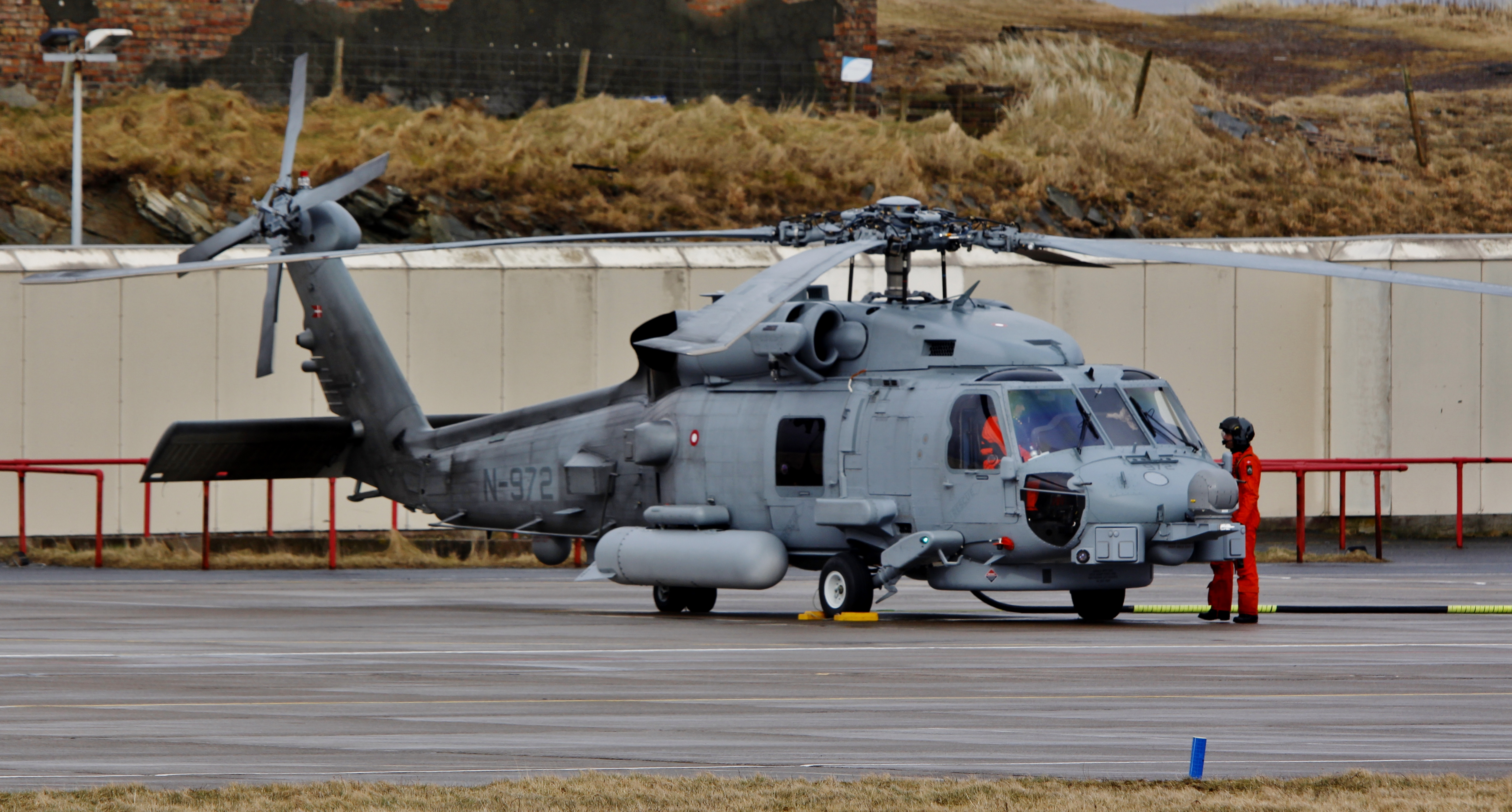 Fuel stop at Sumburgh